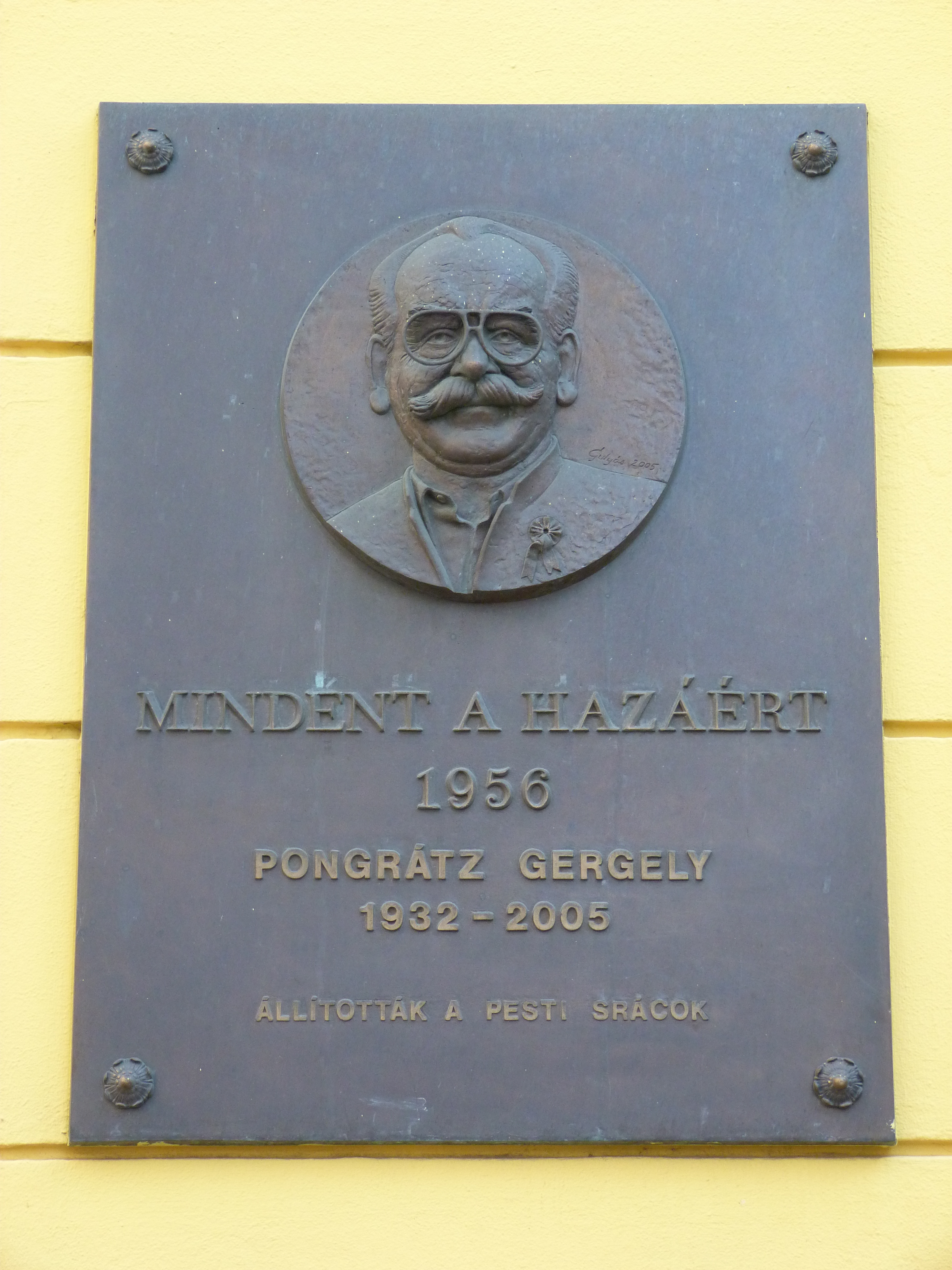 A felvétel 2012. december 5 -én készült Budapesten, a Józsefvárosban. Corvin köz. ©© Published under Creative Commons in the Metapolisz DVD line. All of the photos and vids in the Metapolisz DVD line are under Creative Commons and can be used even for commercial – for profit – purposes. Recommended Citation Derzsi Elekes Andor: Metapolisz DVD line ©© Megjelent Creative Commons alatt a Metapolisz sorozatban. A Metapolisz sorozat valamennyi képe és filmje Creative Commons alatti valamint kereskedelmi - for profit - célra is felhasználható. Ajánlott hivatkozás: Derzsi Elekes Andor: Metapolisz DVD line . Másik fénykép ugyanerről a tábláról: File:PongratzGergely Corvin1.jpg